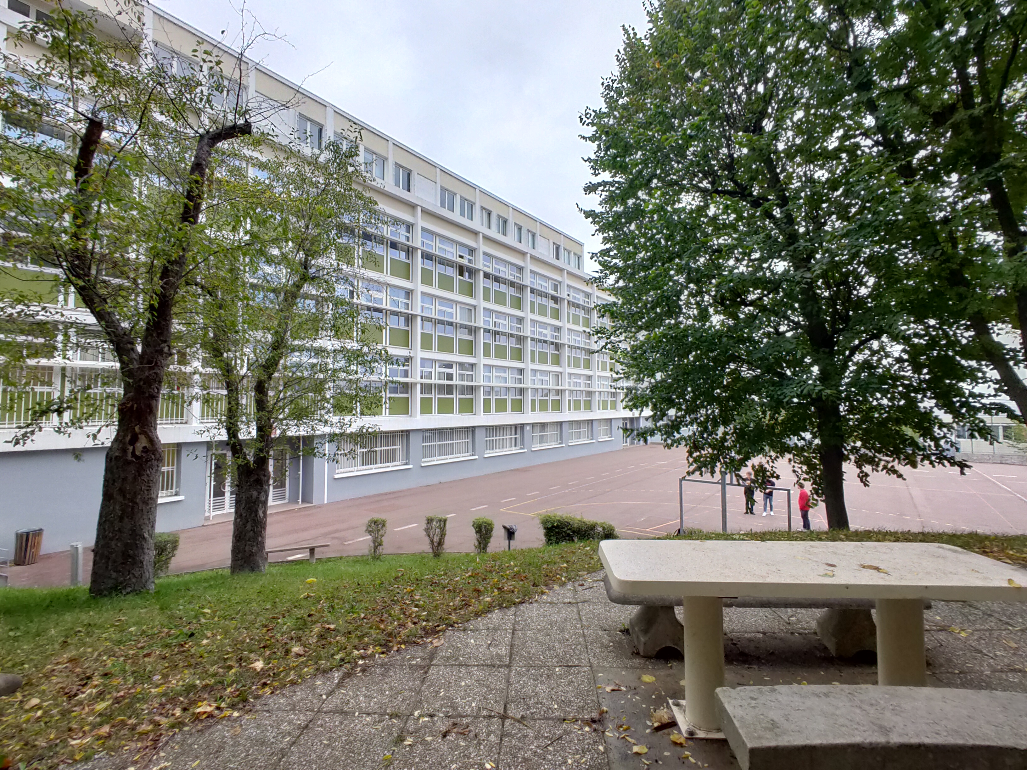 Façade du bâtiment principal vue depuis la cour de récréation.